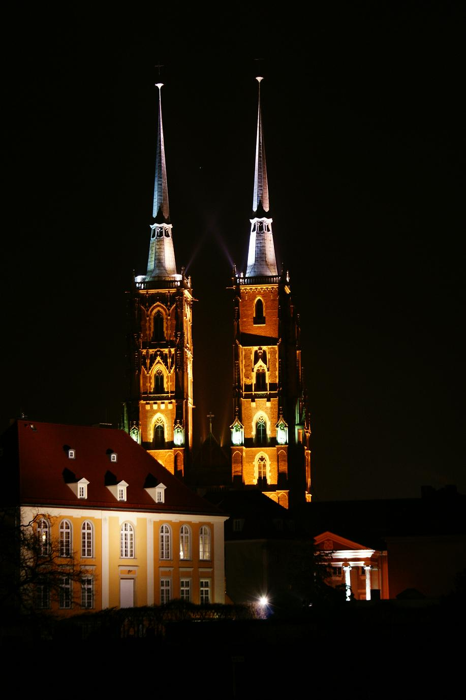 Katedra